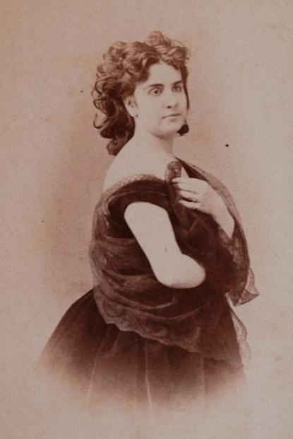 Dionisia Fité de Goula (1847 -1873)